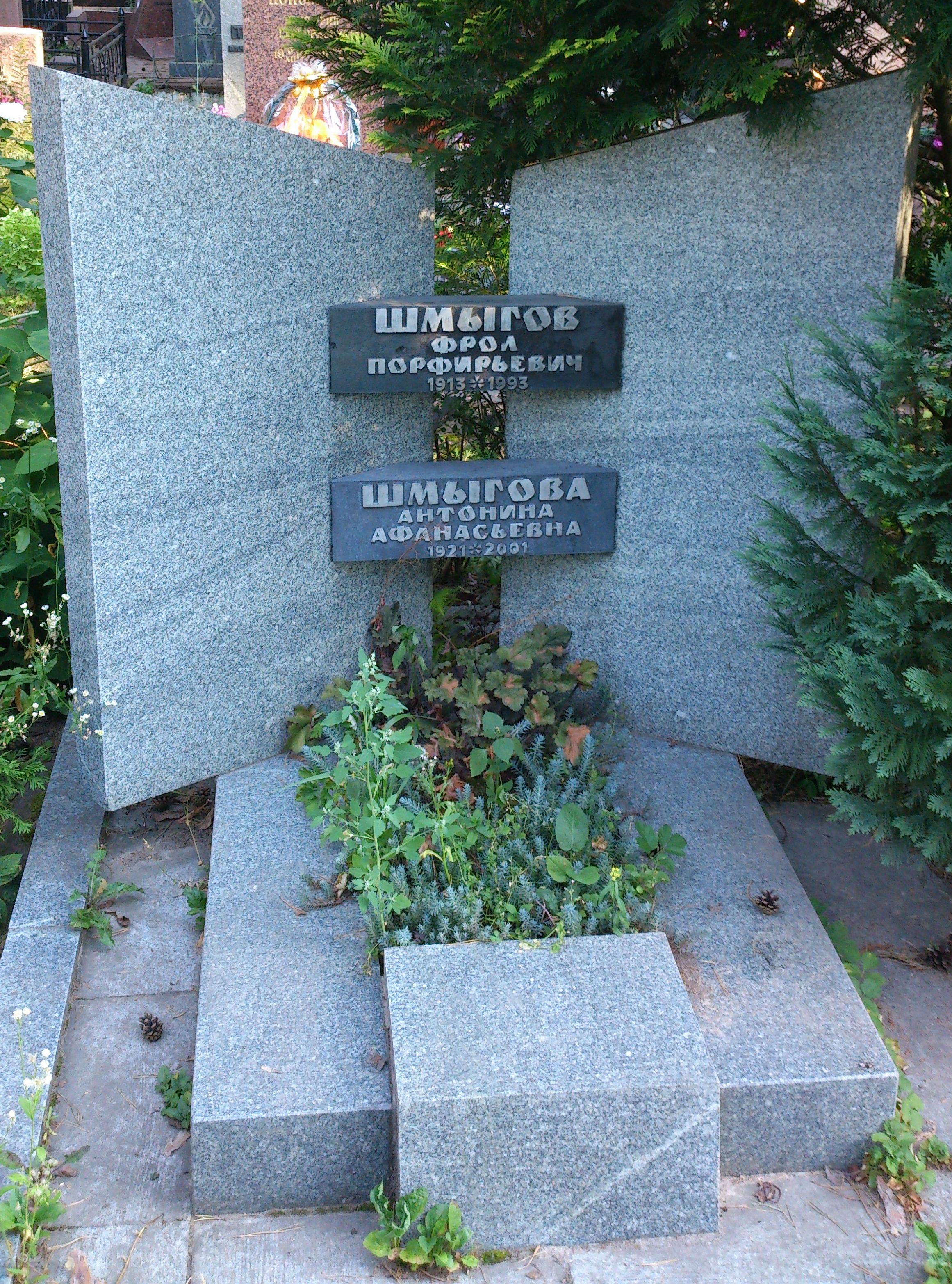 Надгробный памятник белорусского историка и дипломата Фрола Шмыгова на Восточном кладбище г. Минска